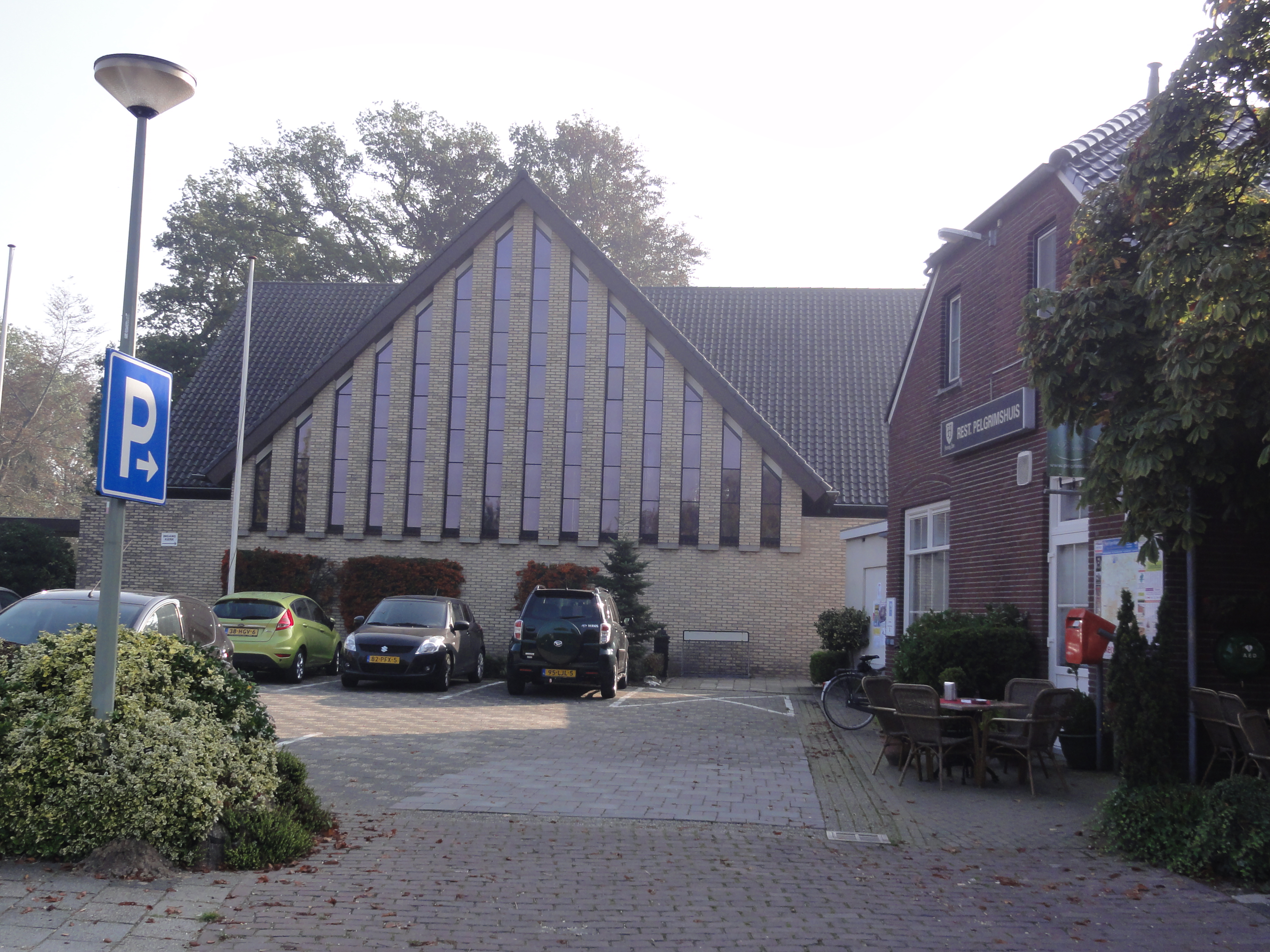 Smakt (Venray) nieuwe kerk